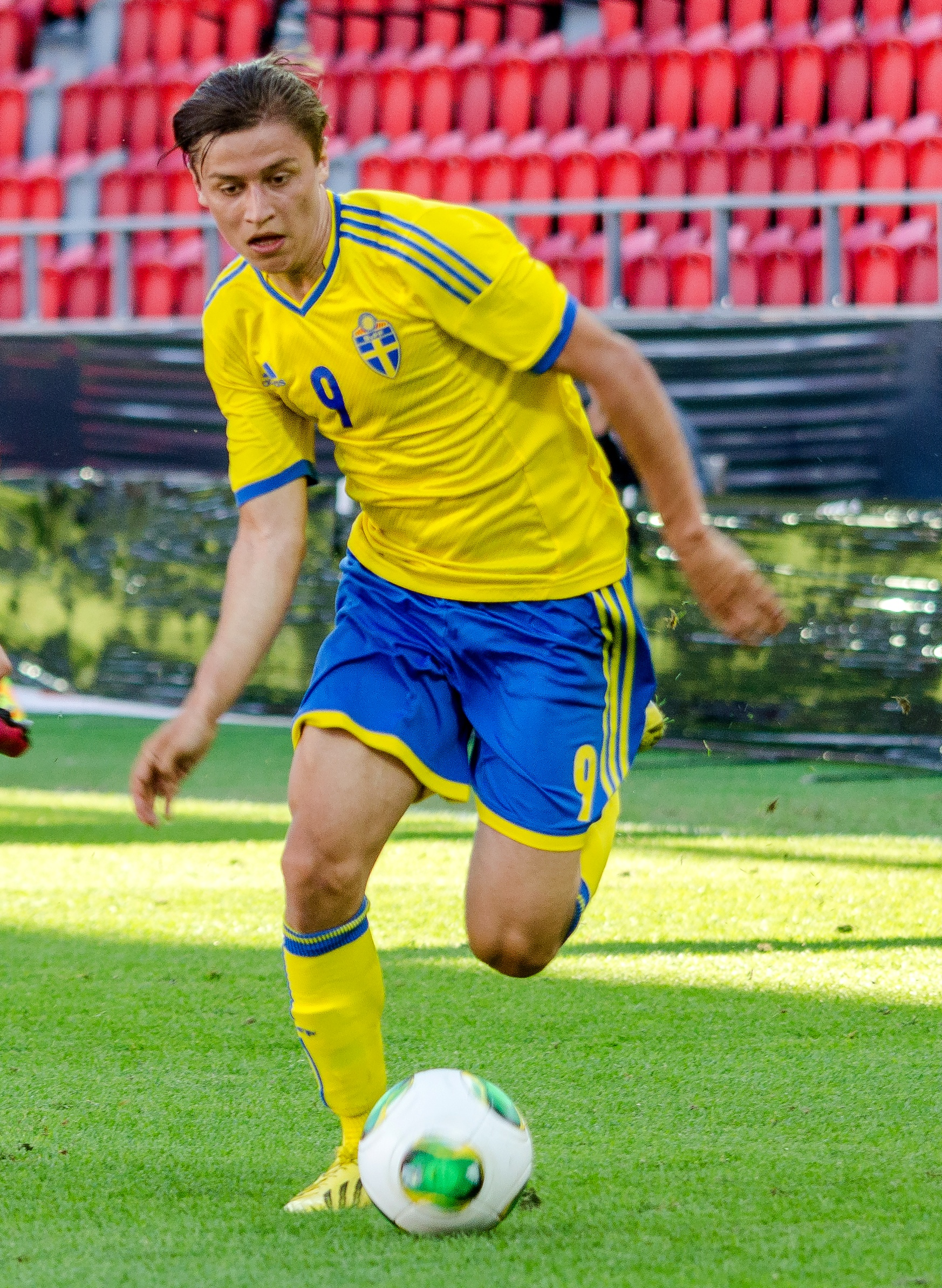 Offensive mittfältaren Simon Thern i det svenska U21-landslagets 3-2 seger mot Schweiz i en träninglandskamp på Myresjöhus Arena i Växjö, 6/6 2013.